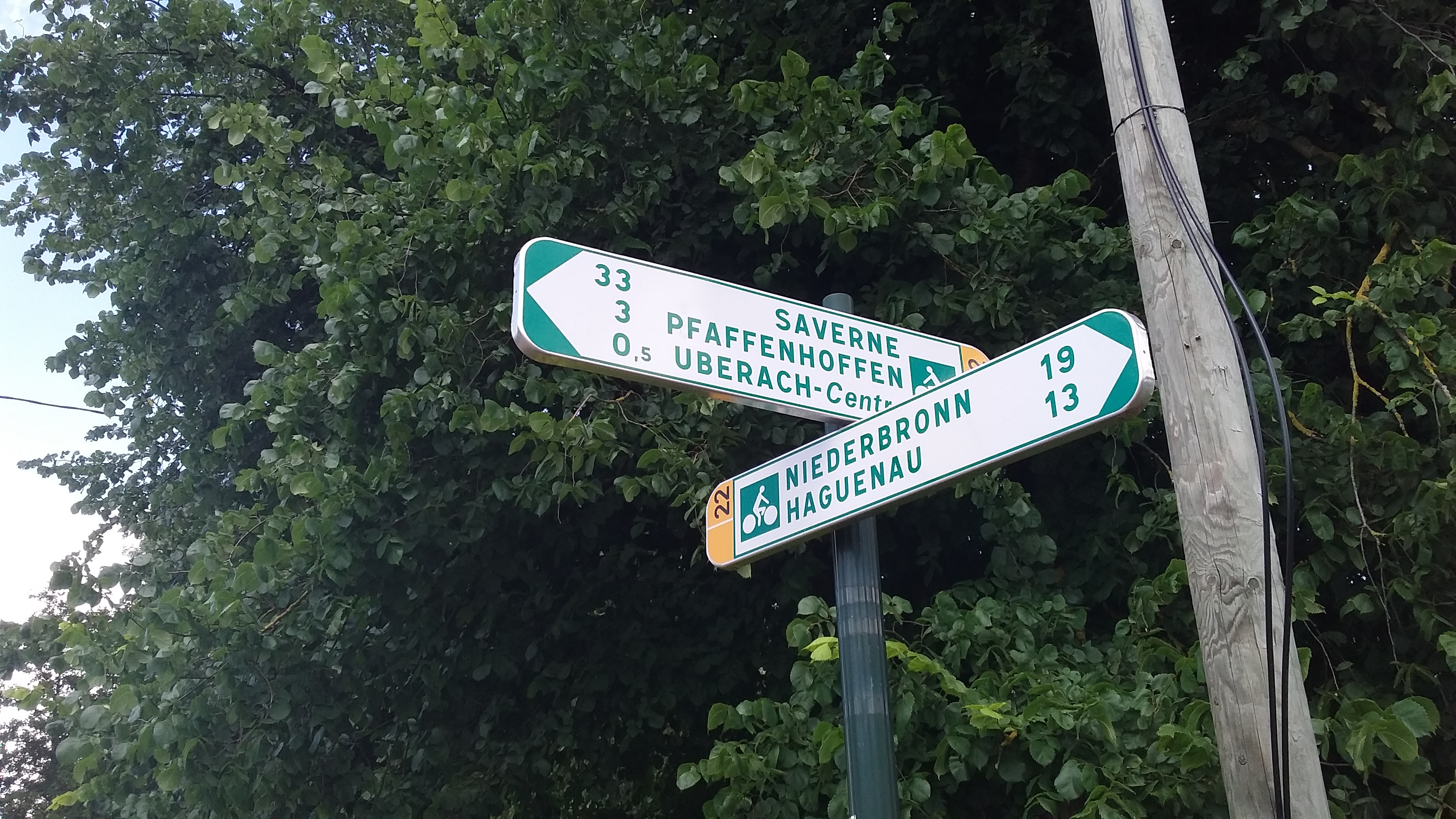 Piste cyclable Haguenau-Saverne, sur la commune d'Uberach.